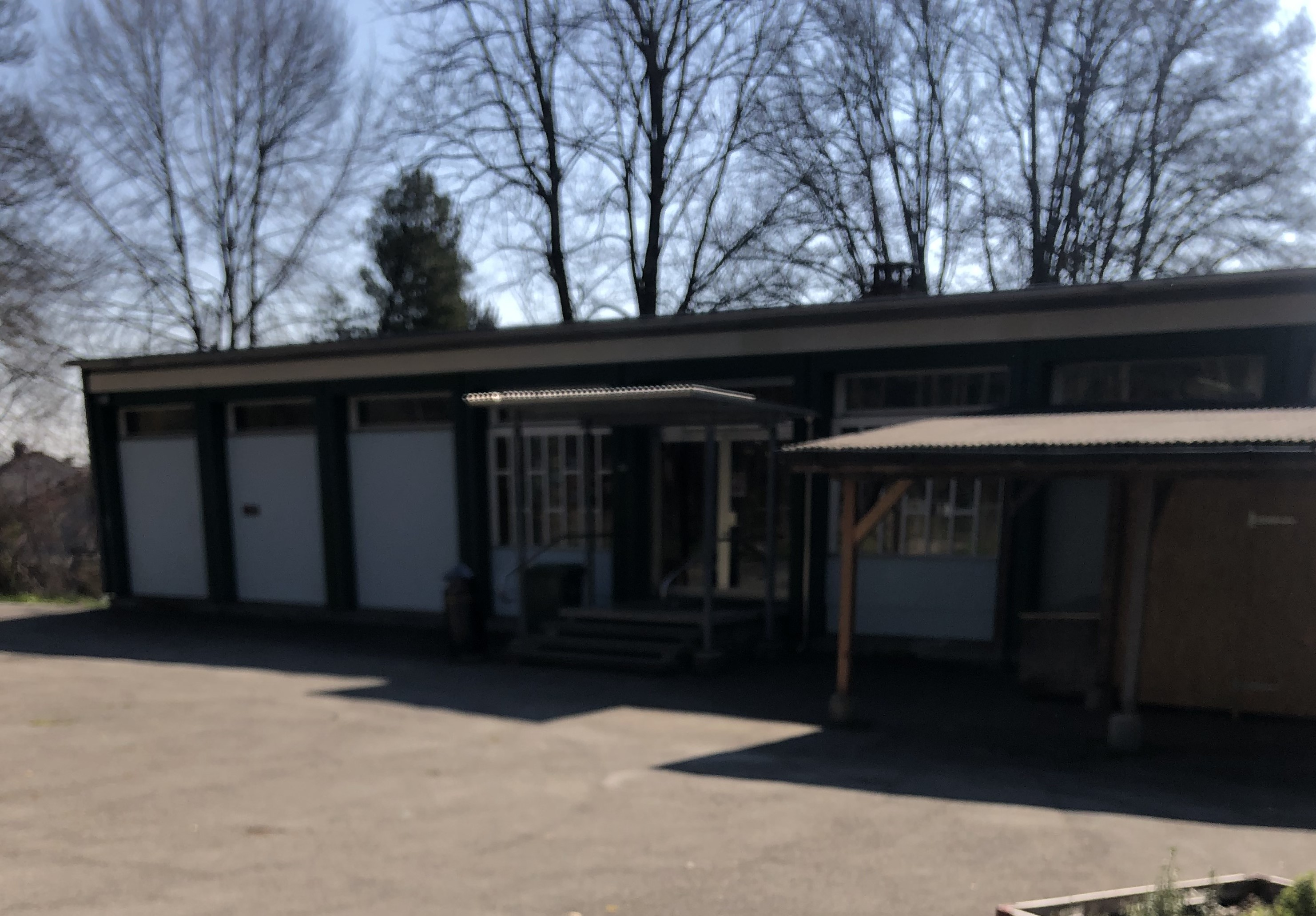 Winterhale Kindergarten